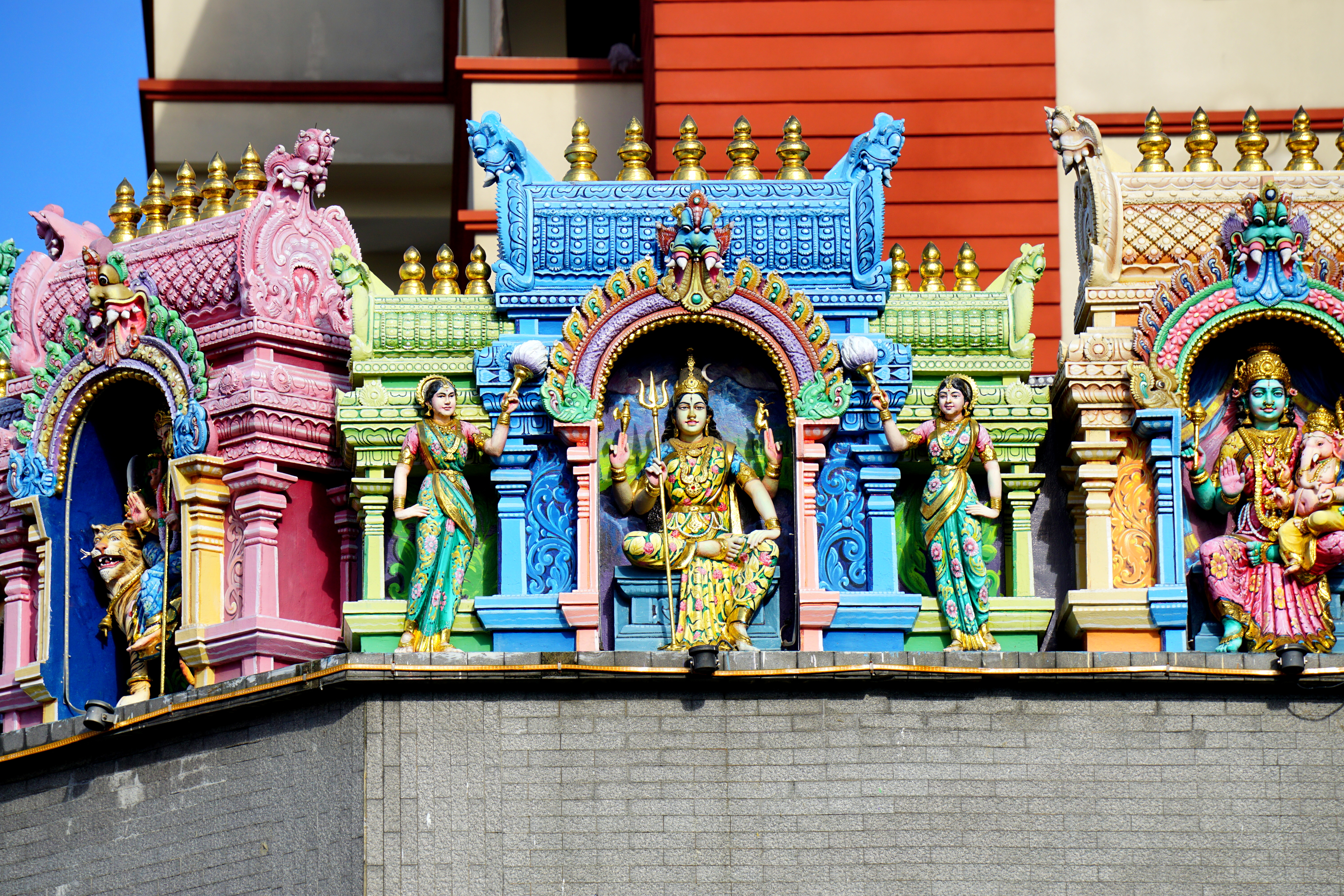 007 Mariamman, Veeramakaliamman Temple, Singapore Veerammakaliamman Temple, Singapore